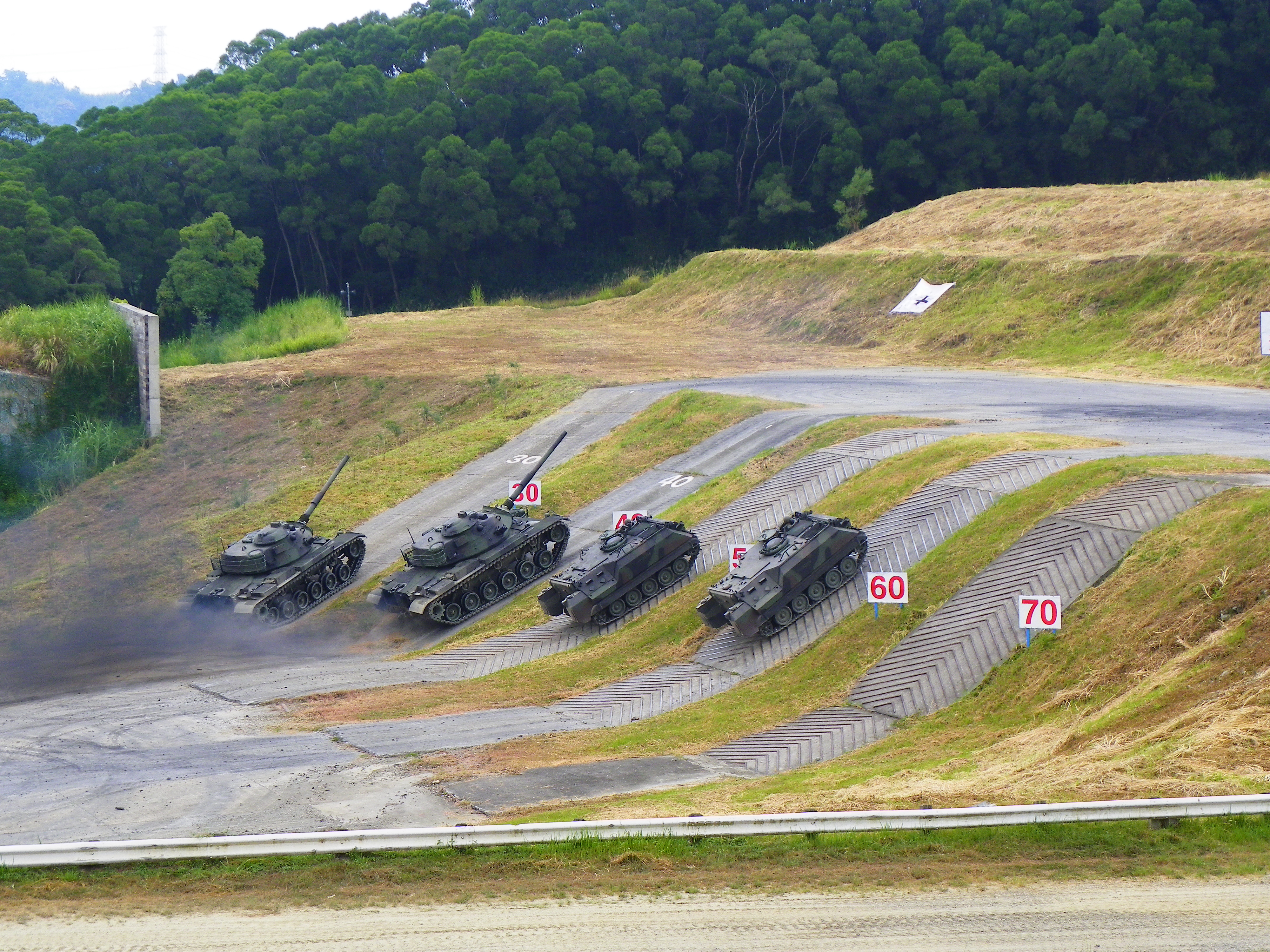 戰甲車動態性能展示開始！M60A3 TTS戰車與CM-21A裝甲運兵車開始攀登角度不同的坡道。